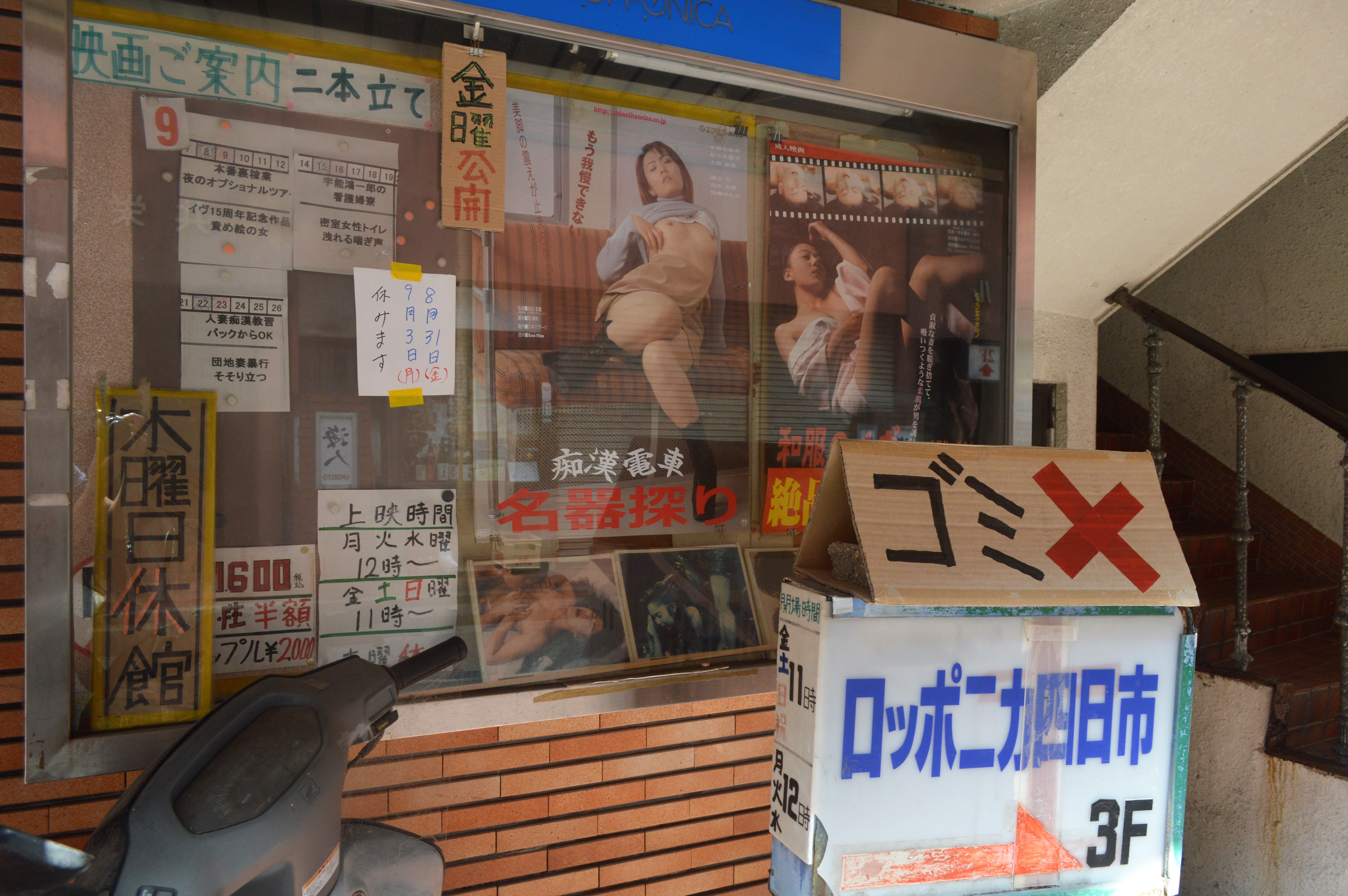 三重県四日市市にあるロッポニカ四日市。大鯛ビル。